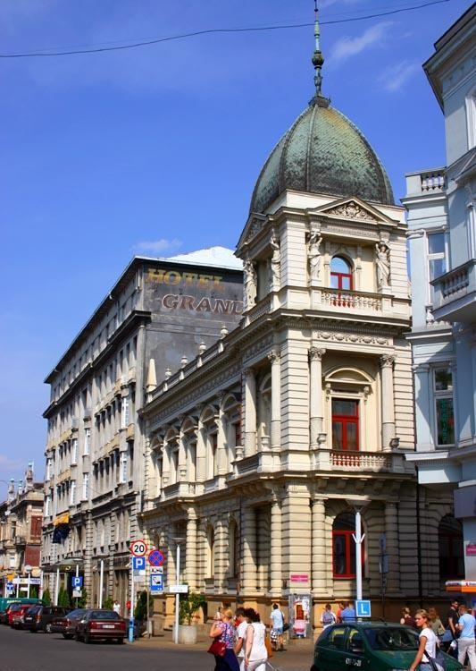 Ulica Piotrkowska, Łódź